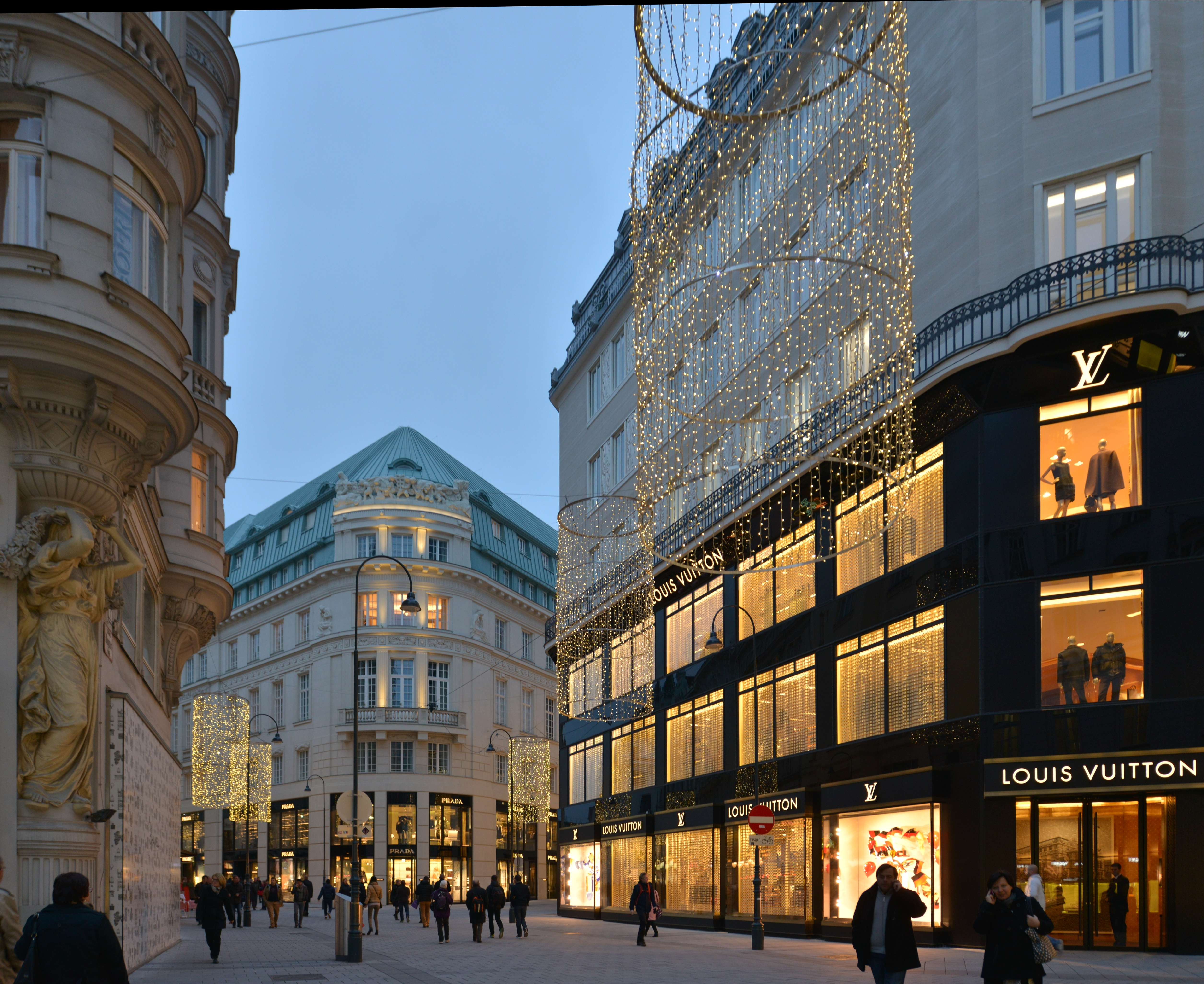 Bognergasse 4 Prada rechts daneben Tuchlauben 3-7 Louis Vuitton in Wien, Österreich Louis Vuitton